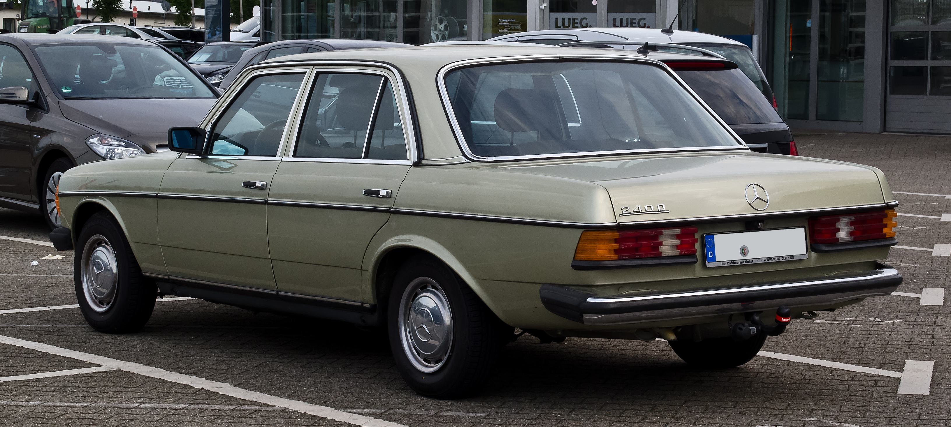 Mercedes-Benz 240 D (W 123, Facelift)